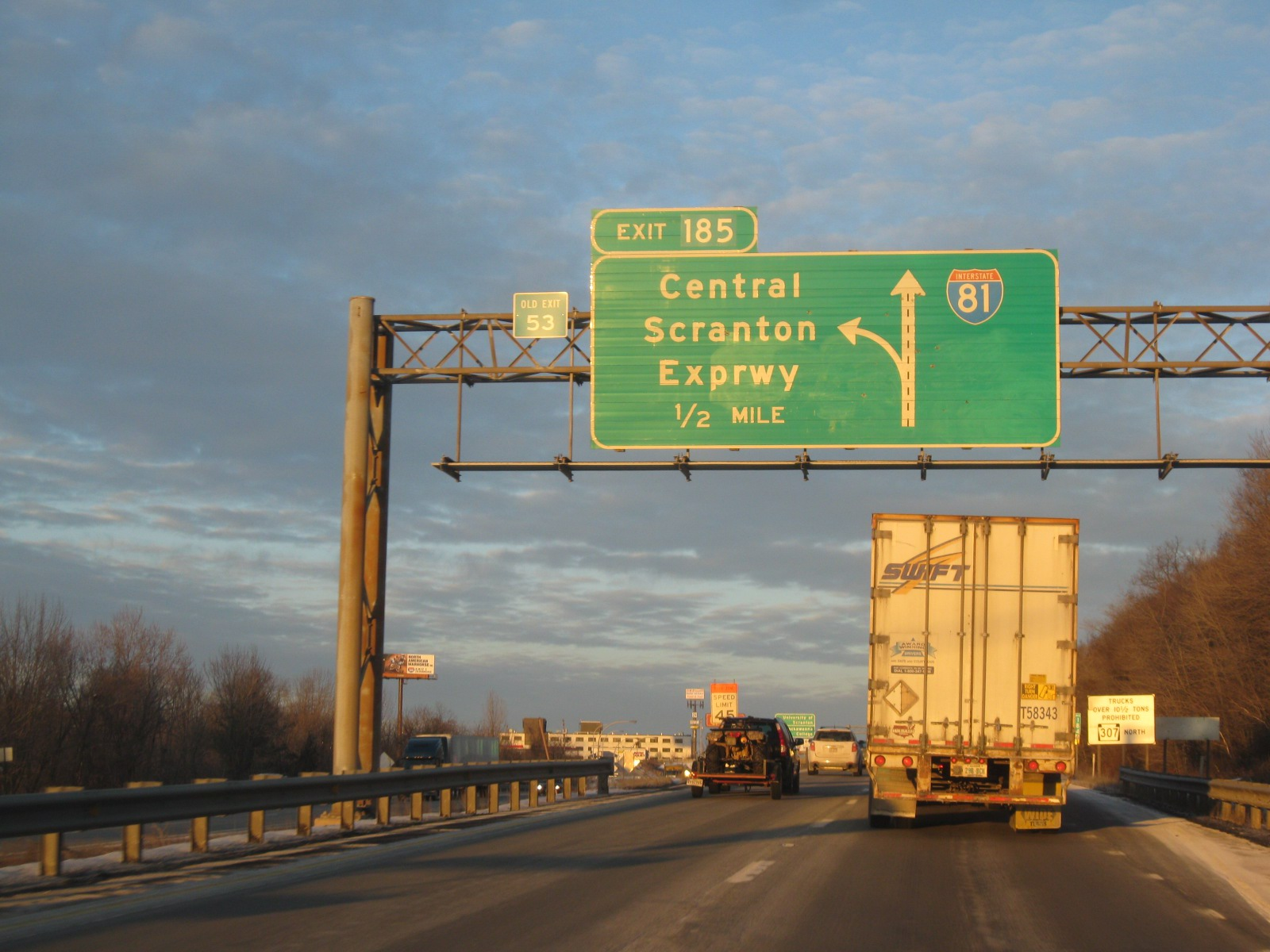 Interstate 81 in Pennsylvania